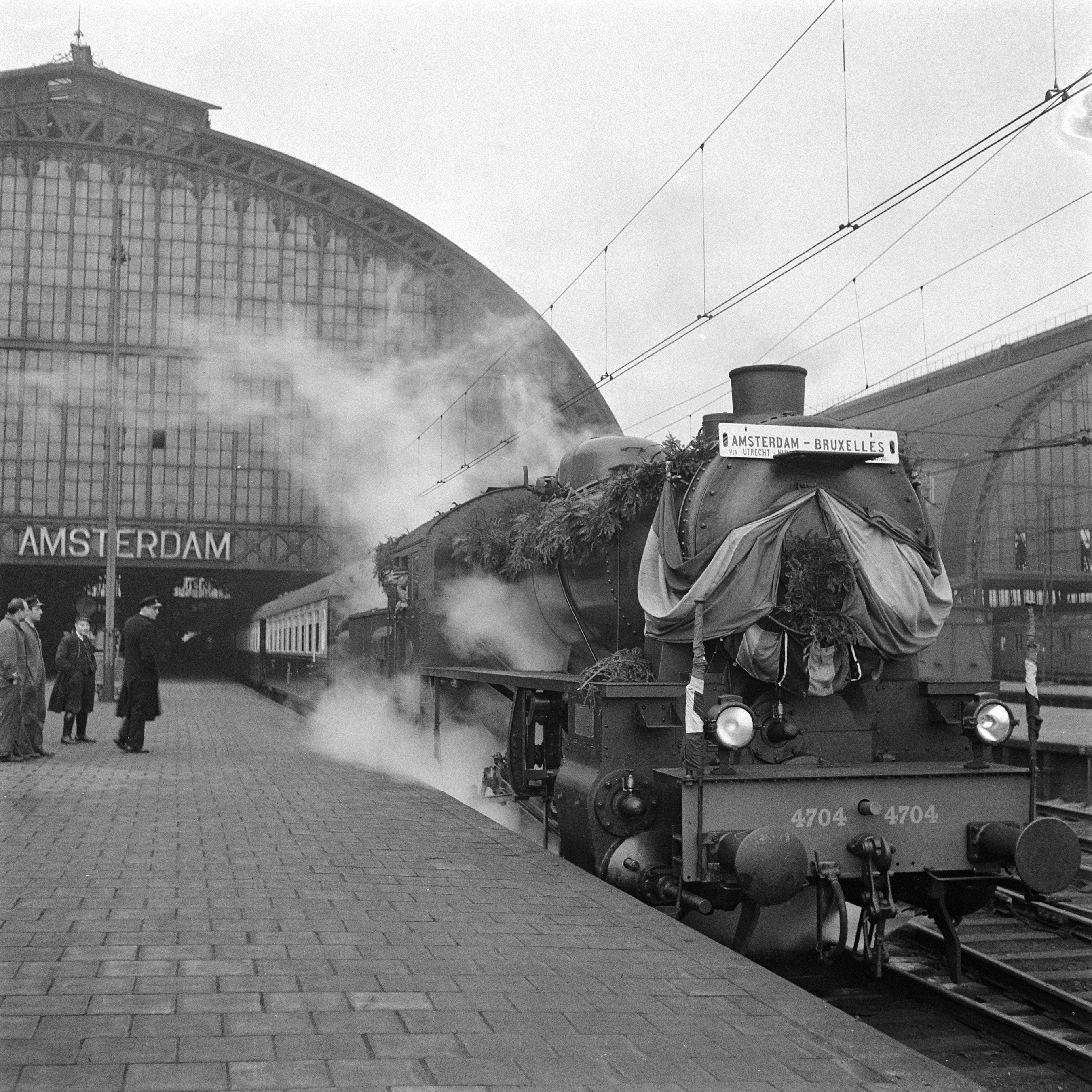 Collectie / Archief : Fotocollectie Anefo Reportage / Serie : [ onbekend ] Beschrijving : Eerste Pullman trein naar Brussel Datum : 5 december 1945 Locatie : Brussel Trefwoorden : treinen Fotograaf : Haren Noman, Theo van / Anefo Auteursrechthebbende : Nationaal Archief Materiaalsoort : Negatief (zwart/wit) Nummer archiefinventaris : bekijk toegang 2.24.01.03 Bestanddeelnummer : 901-2111